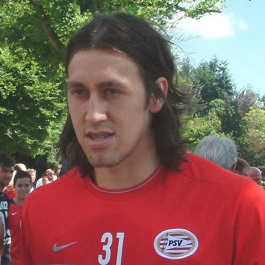 Cássio Ramos, PSV Eindhoven, nr 31. Op de Herdgang